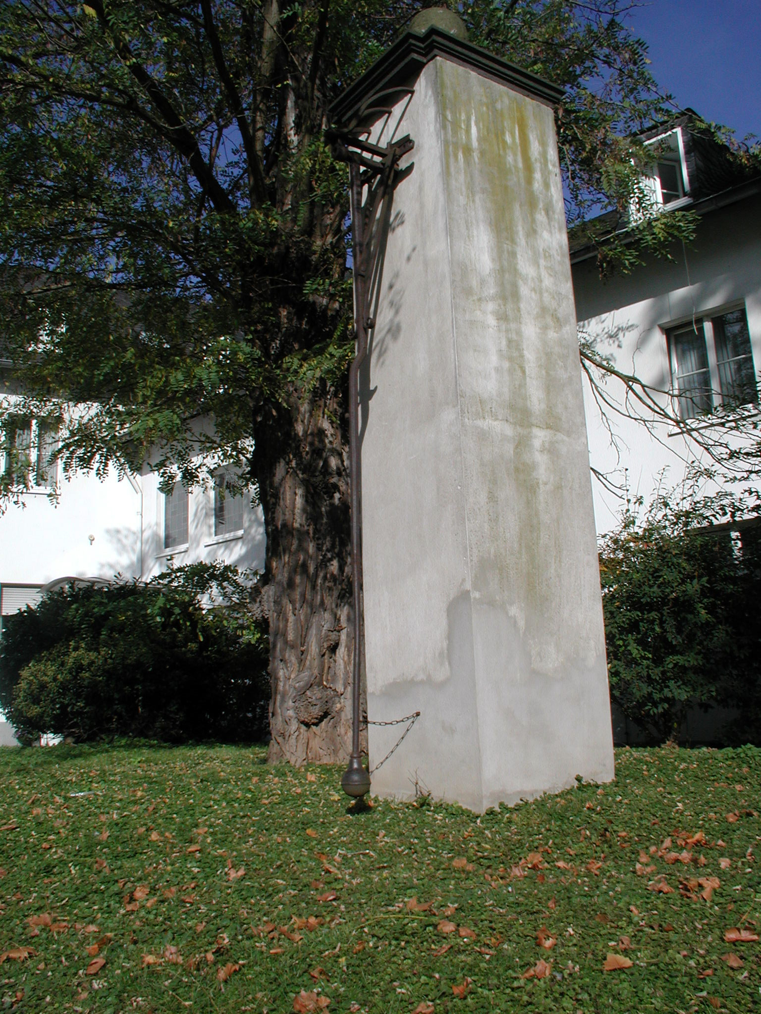 Köln, St. Pantaleon - Wasserpumpe auf dem Klosterhof